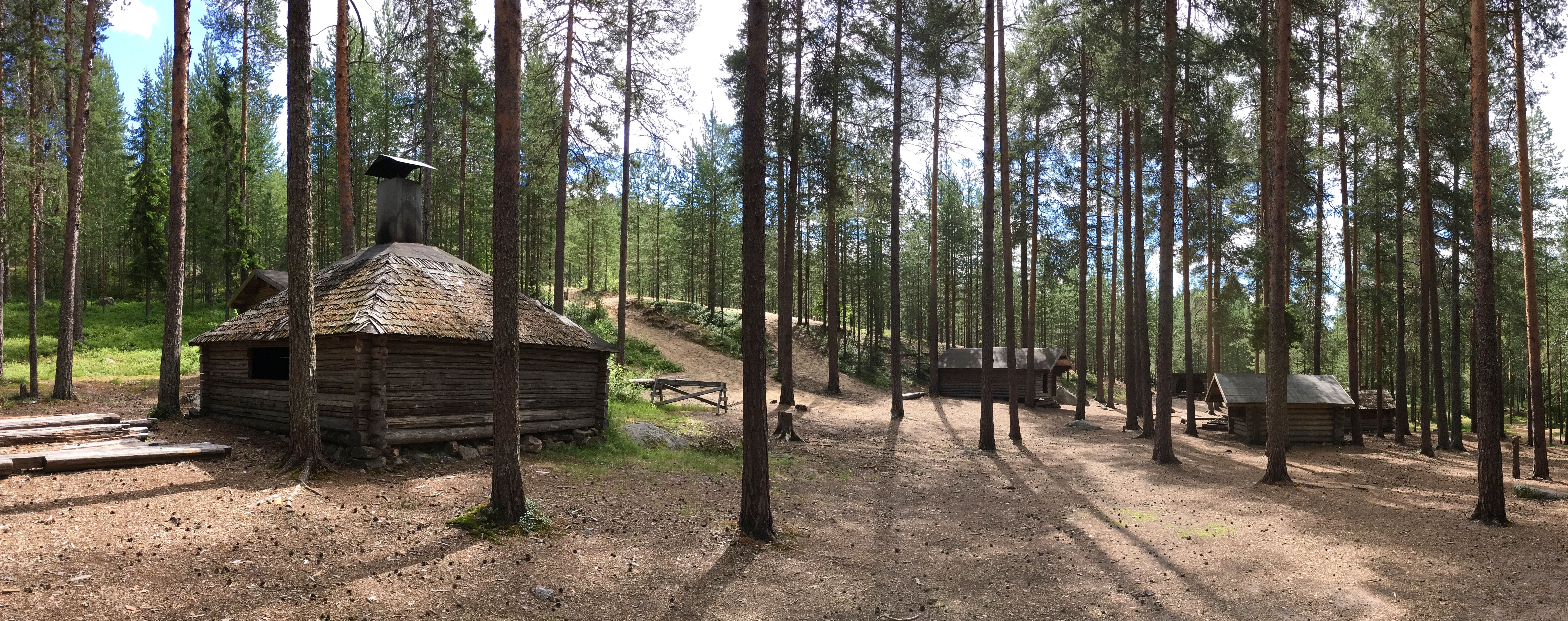 Gruvberget är ett friluftsområde i Boden. Vintertid finns en pulkbacke och möjlighet till längdskidåkning i ett 2,5 km långt elljusspår. Berget har utsikt över Bodens tätort med omnejd. På bild kulturområdet vid bergets fot, sommaren 2016.